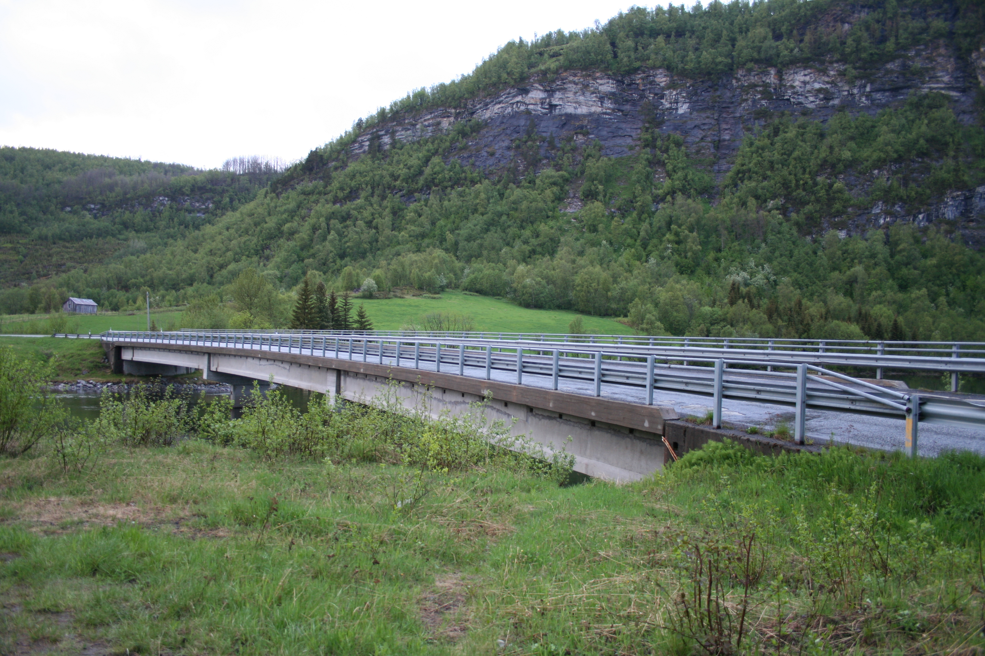 Strokkenes bridge at Riksvei 851 in Salangen in Norway